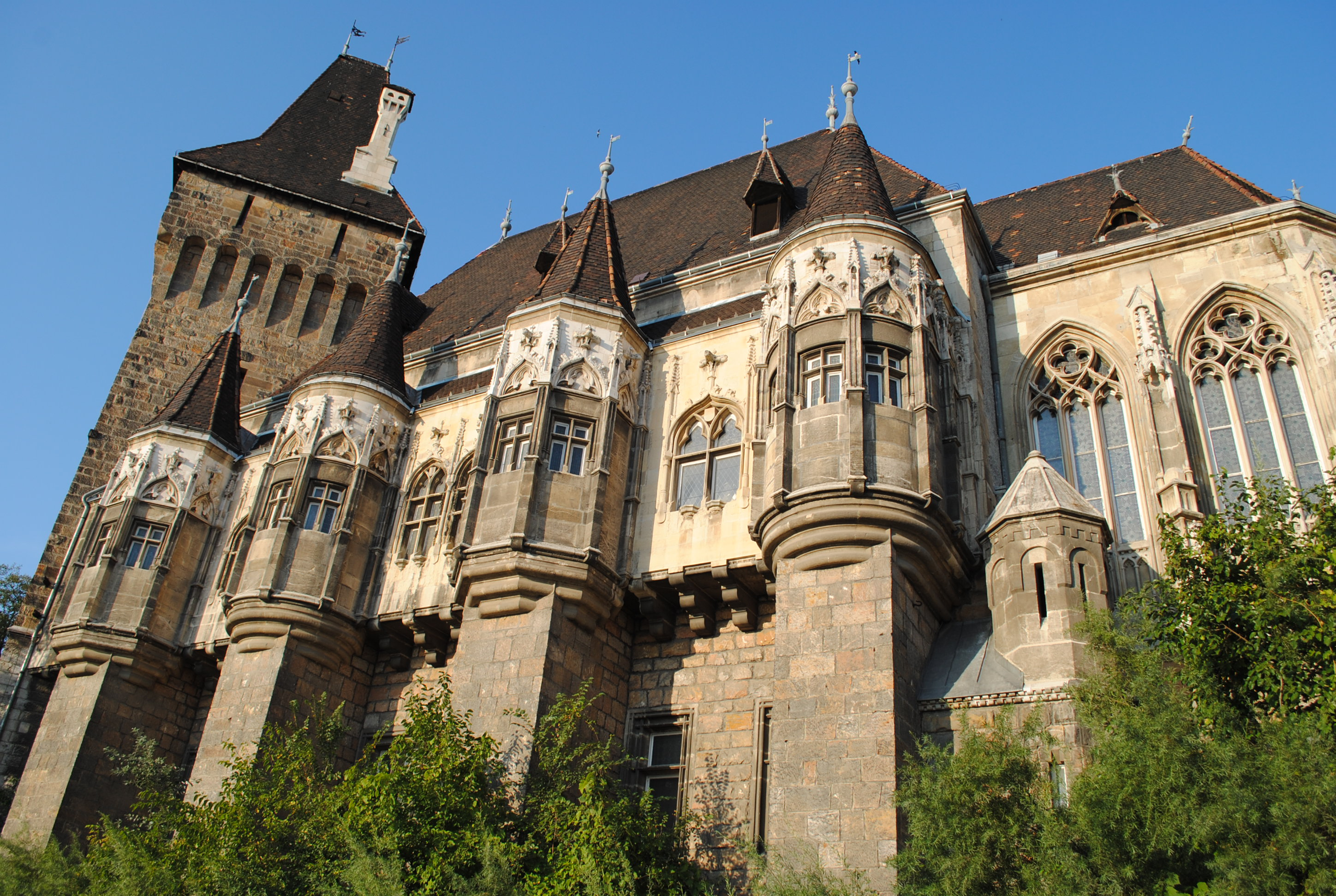 Vajdahunyad vára (Budapest 14, Városliget) This is a photo of a monument in Hungary. Identifier: 16291